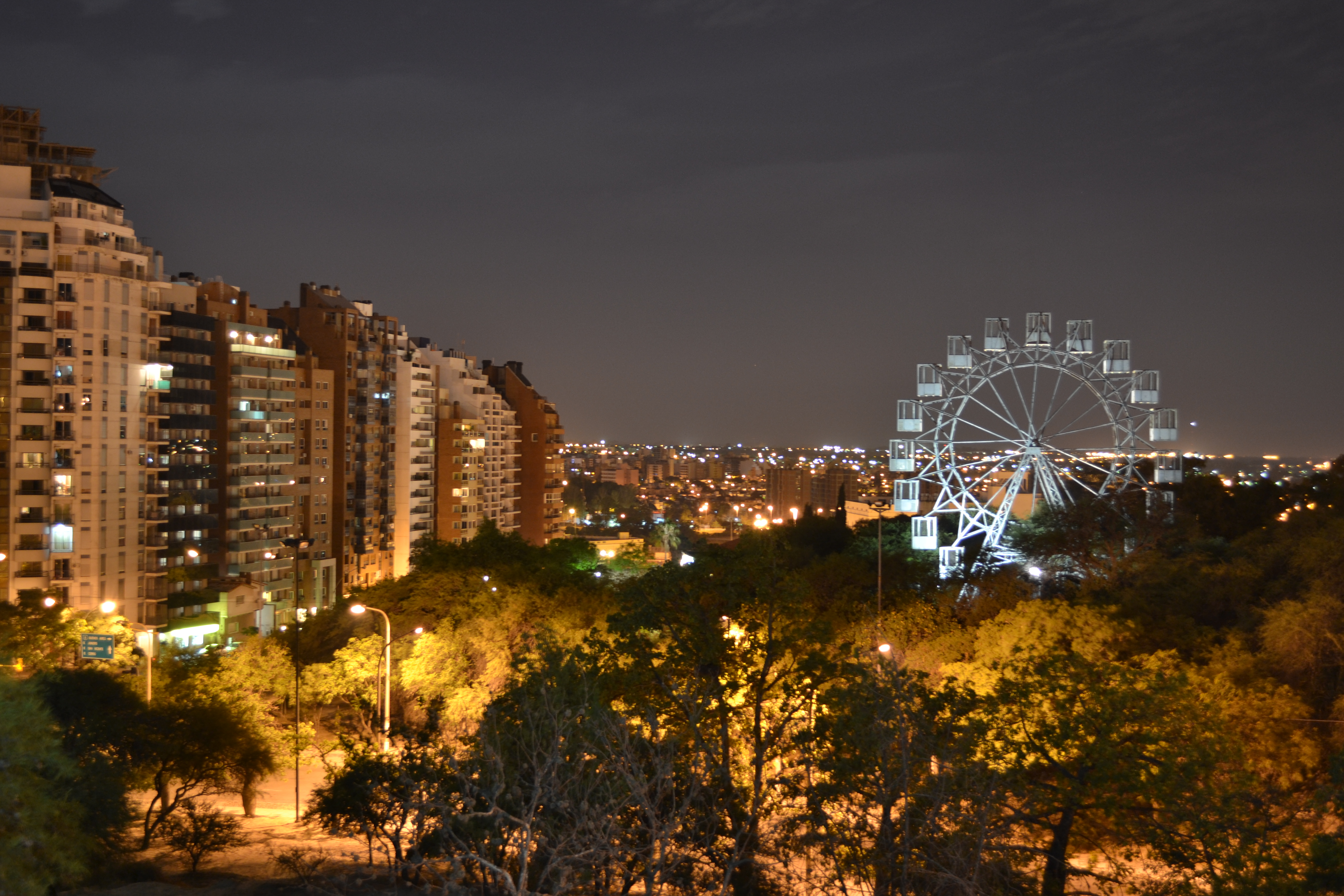 Se trata de una noria ubicada en la ciudad de Córdoba contemplada desde el mirador del Coniferal en el Parque Samiento